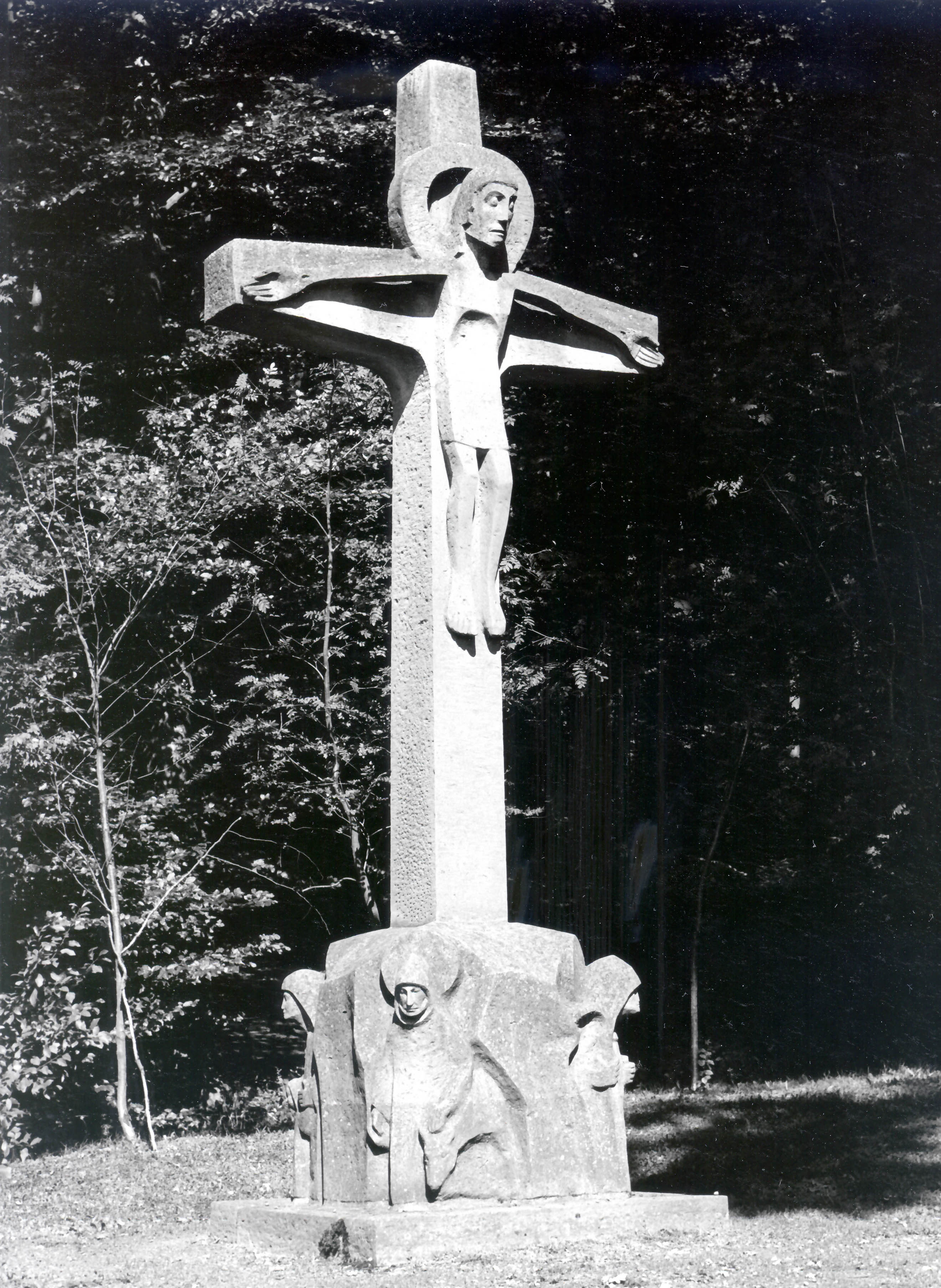 Bildhauerarbeit von Johannes Kirsch